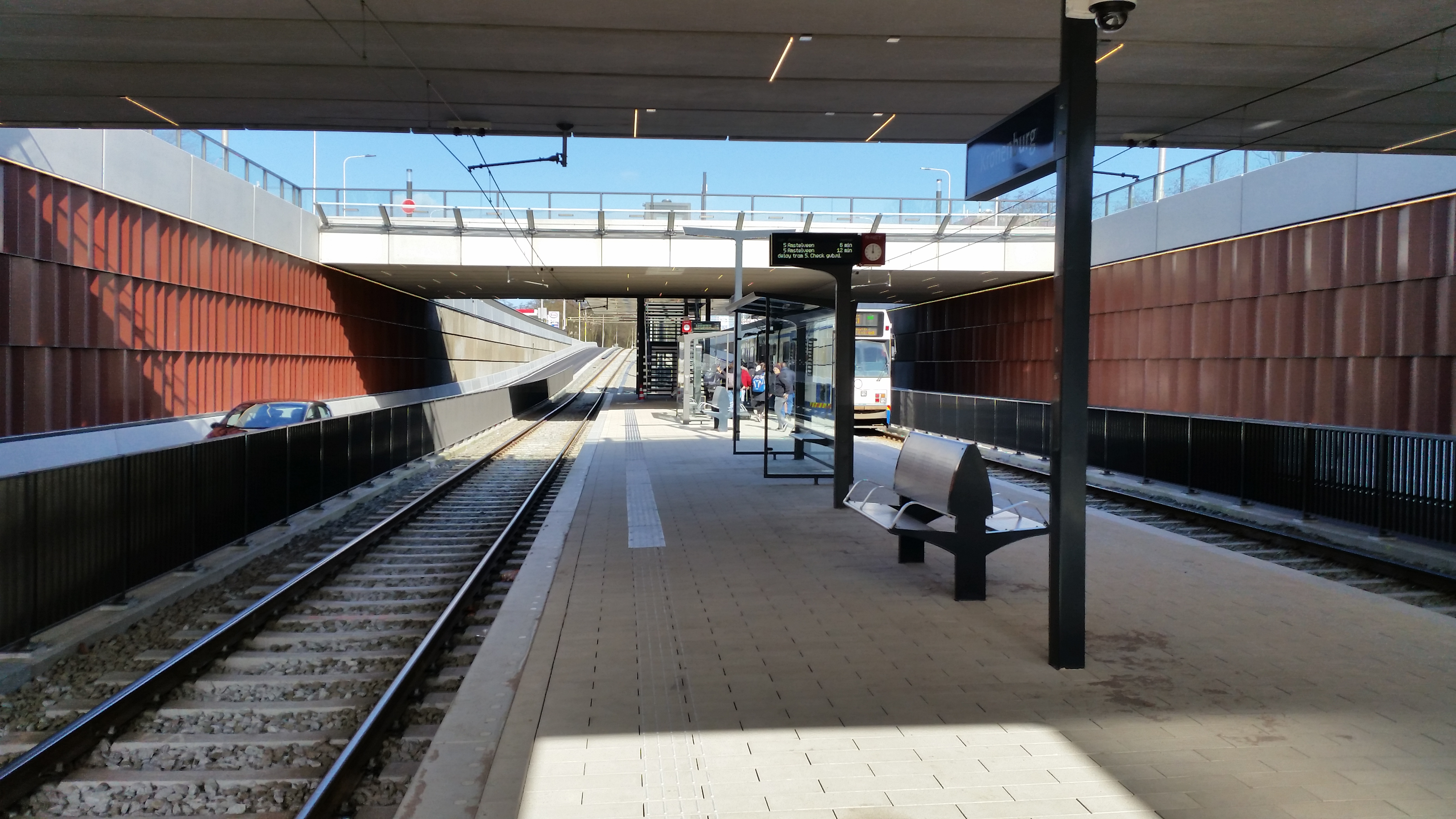 In, boven en om de sneltramhalte Kronenburg, vernieuwd in 2019/2020, waardoor het spoor en de doorgaande route voor autoverkeer ondergronds plaatsvindt.